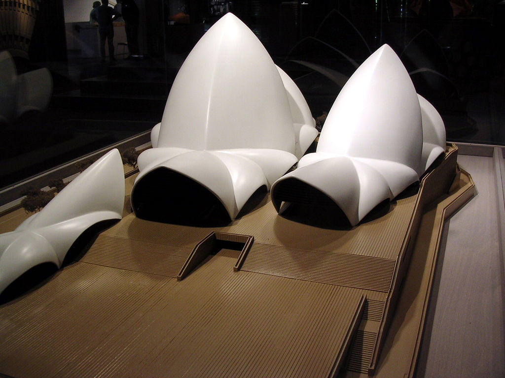 Maqueta de las bóvedas de Sydney